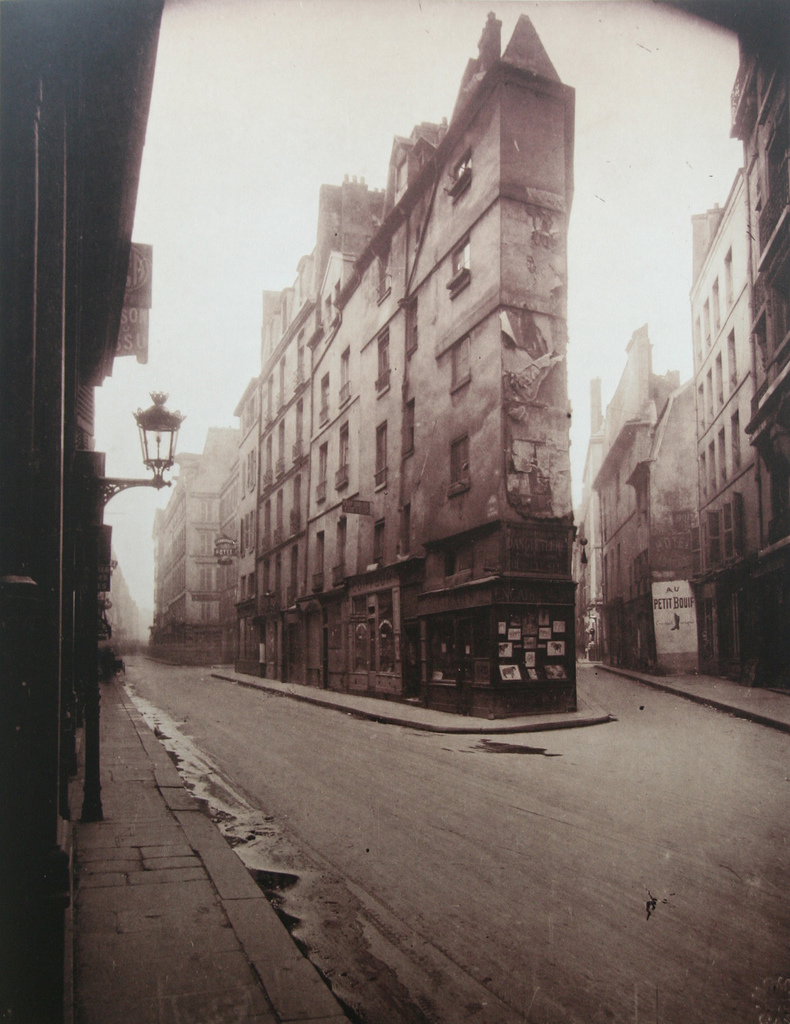 Un coin, à gauche la rue de Seine, à droite la rue de l’Échaudé. Tirage entre 1924 et 1926 d'après négatif de 1924.